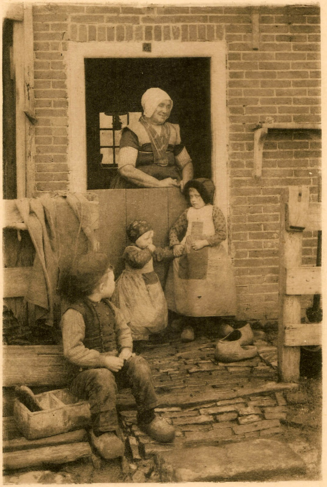 Foto door Adriaan Boer, vrouw met kinderen in Spakenburg. Klederdracht.